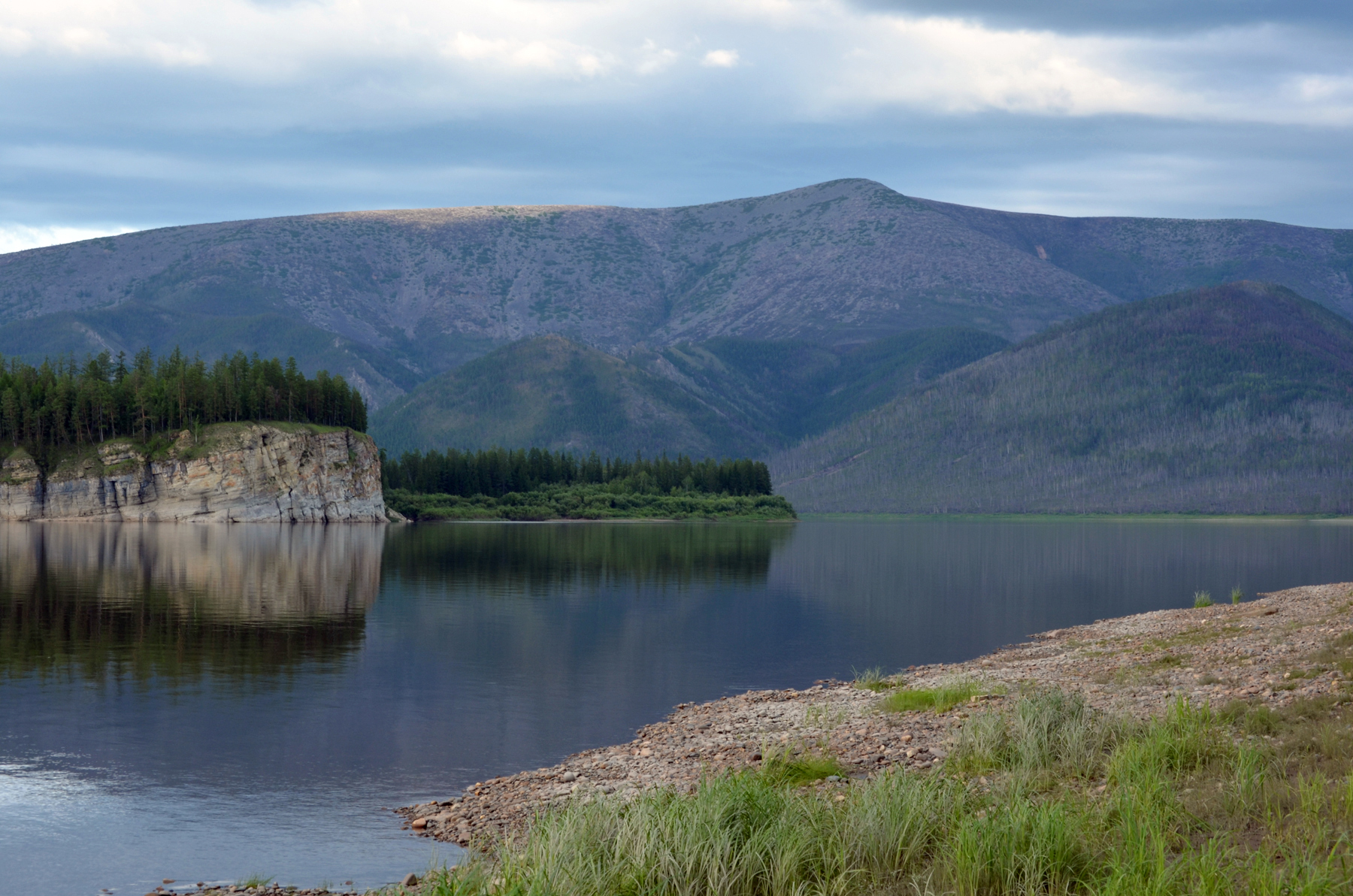 Вид с берега (Кыллахский хребет)